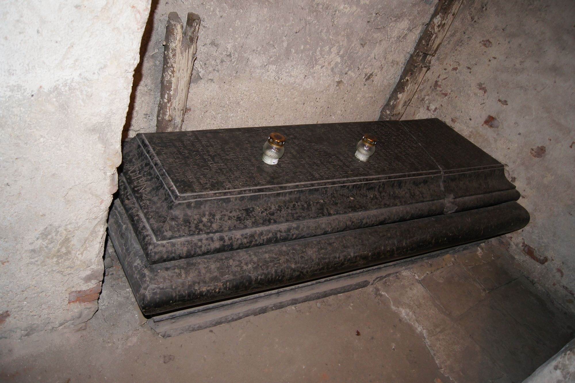 Sarkofag kanclerza Jana Wielopolskiego (1630-1688) w podziemiach kościoła reformatów w Krakowie.